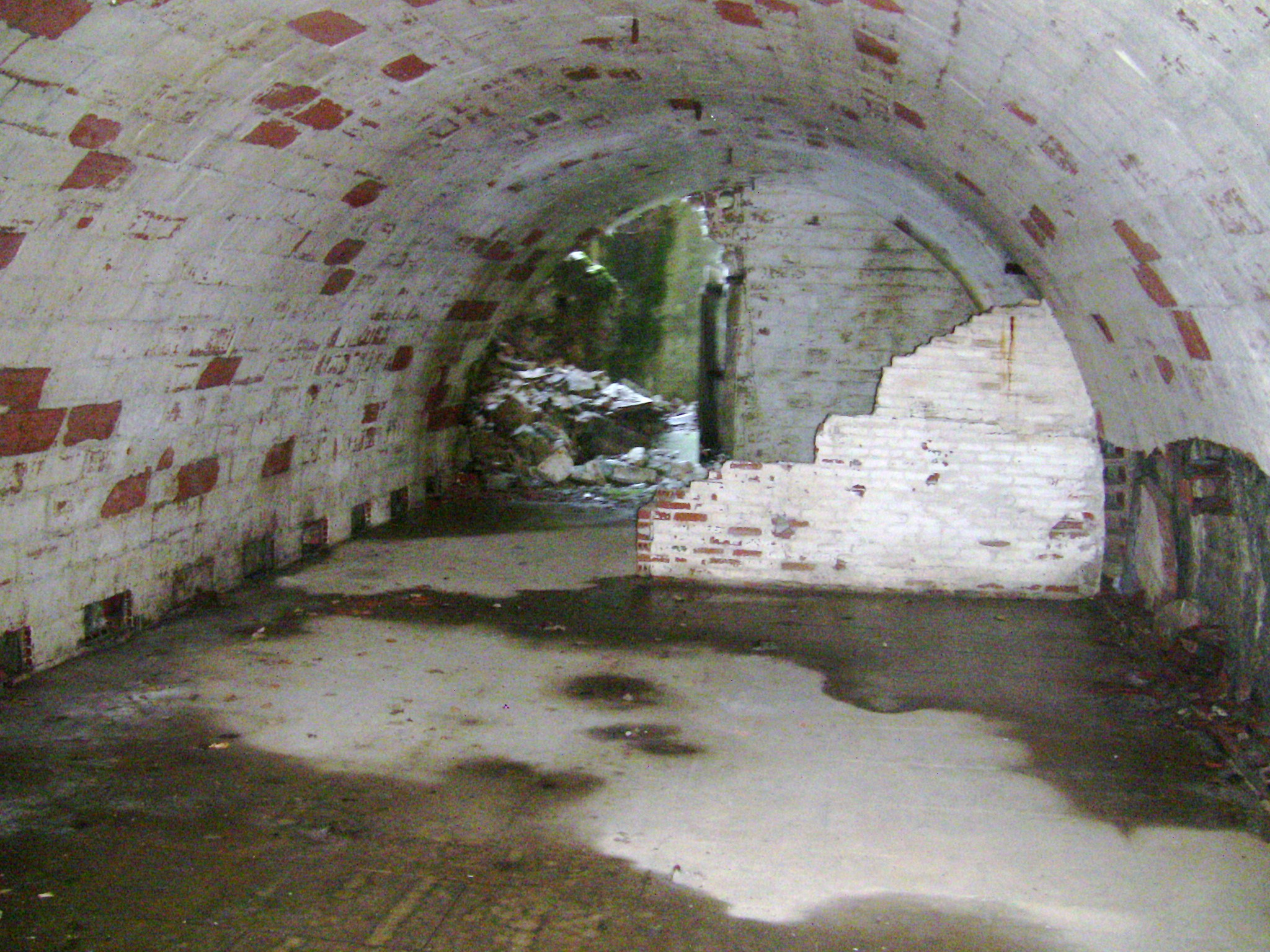 Chambre cachée de l'abris caverne de la carrière du fort de Planoise, à Besançon (Doubs, France).